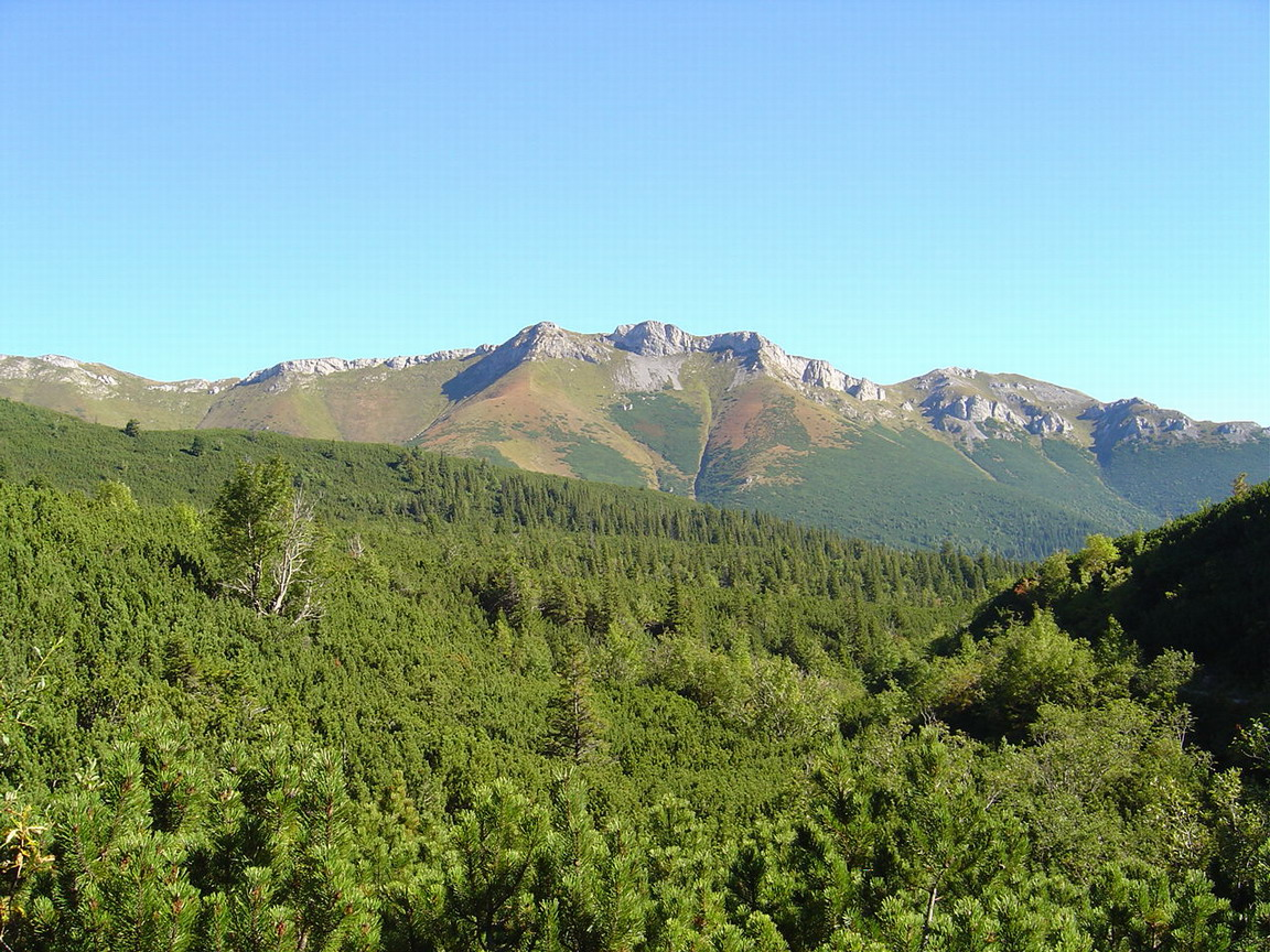 Bujaci vrch (right) and Predne Jatky (middle) from Dolina Zeleneho plesa